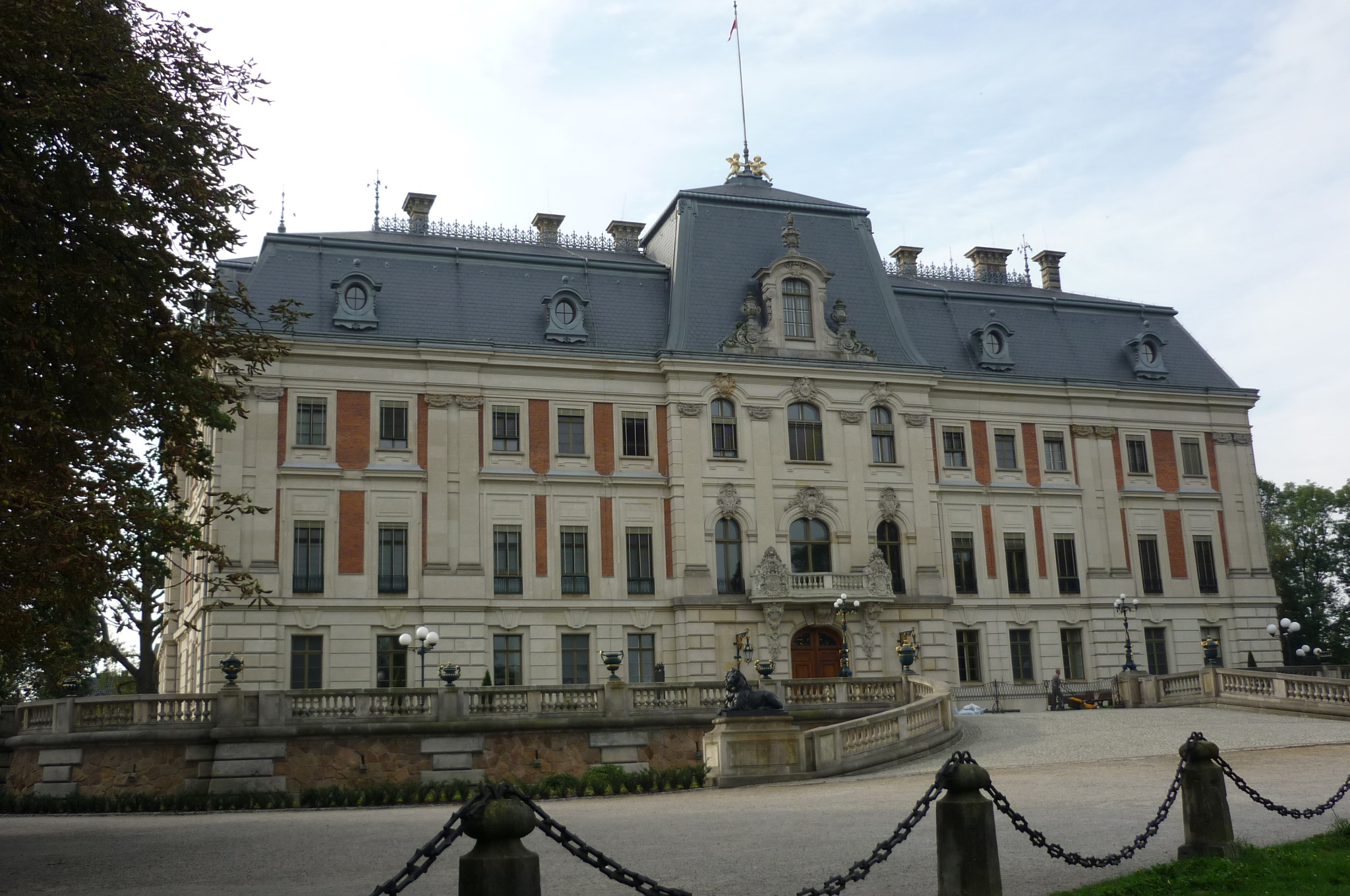 Pszczyna (Pleß) - Schloss - Gartenseite